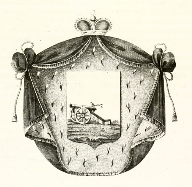 Герб рода князей Вяземских